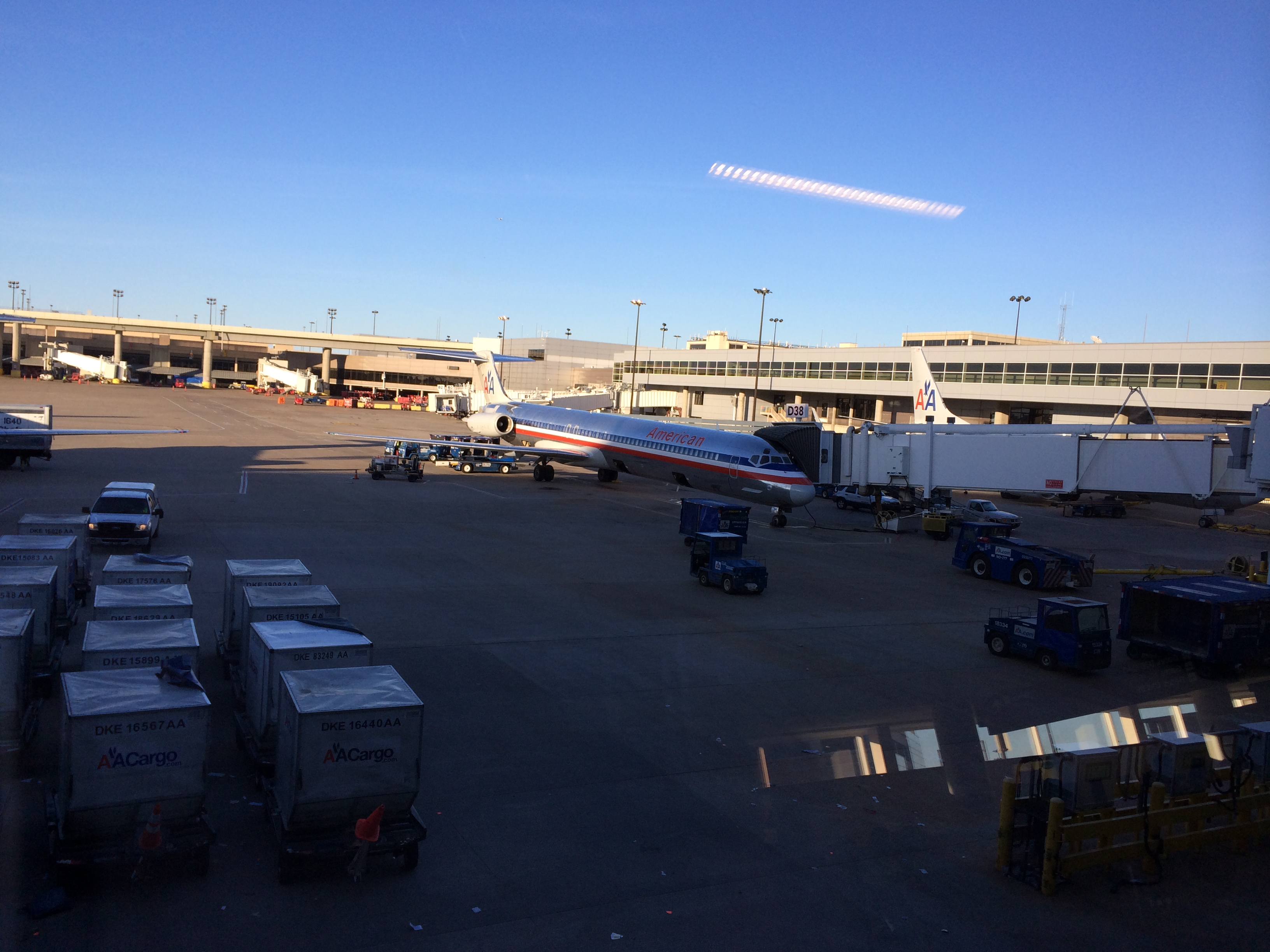 MD-80 de American Airlines en la terminal D del aeropuerto de DFW.